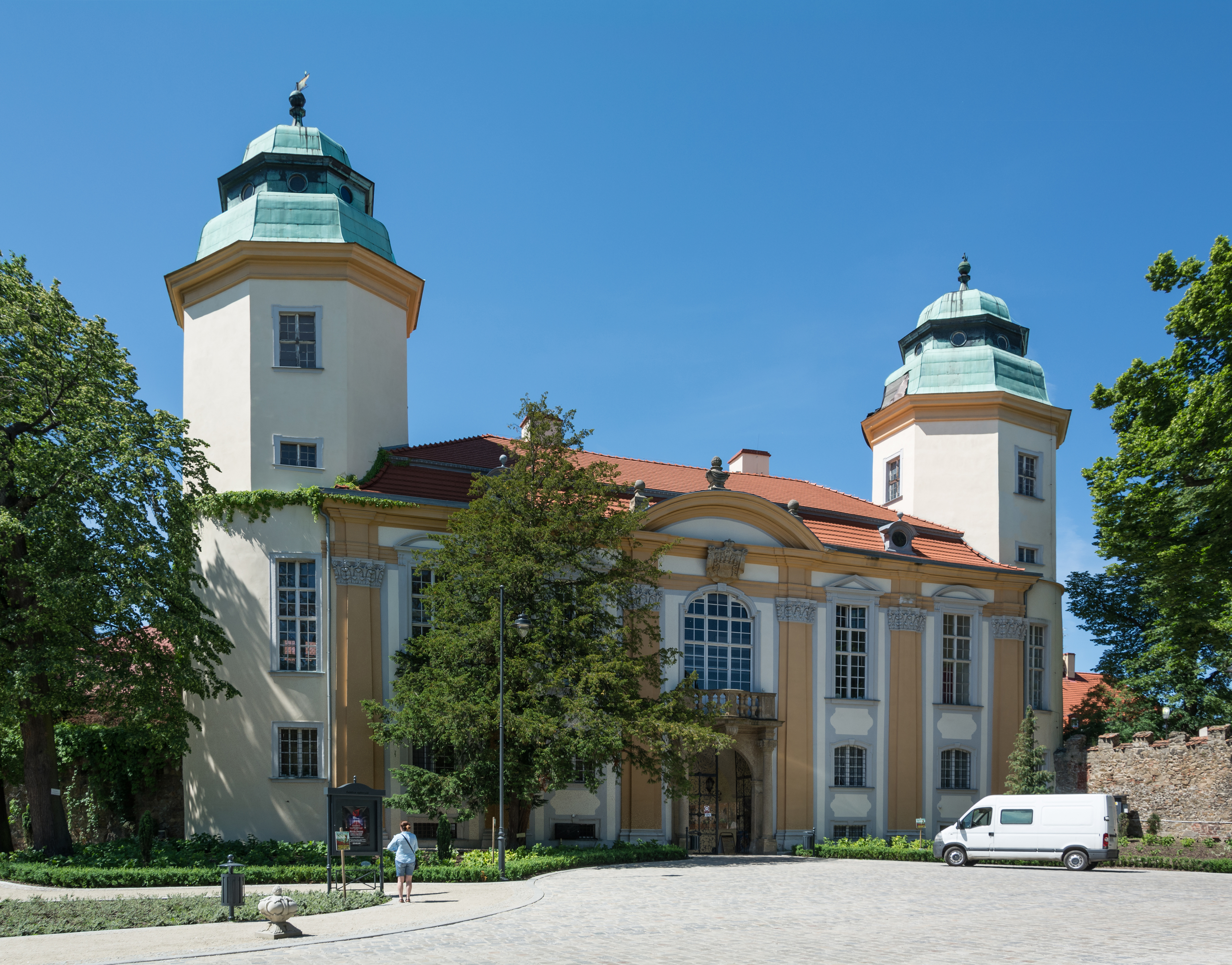 Wałbrzych, budynek bramny (biblioteka), 1718-1719, 1890